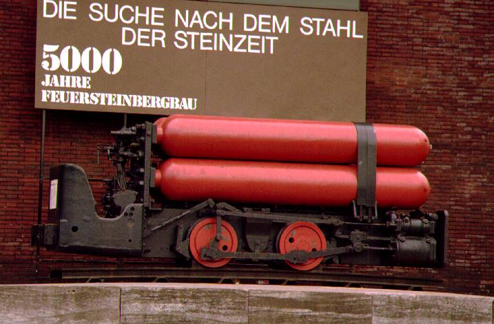 Druckluftlok am Deutsches Bergbaumuseum in Bochum. Stahlflaschenbündel, schiebergesteuerter Hubkolbenmotor.